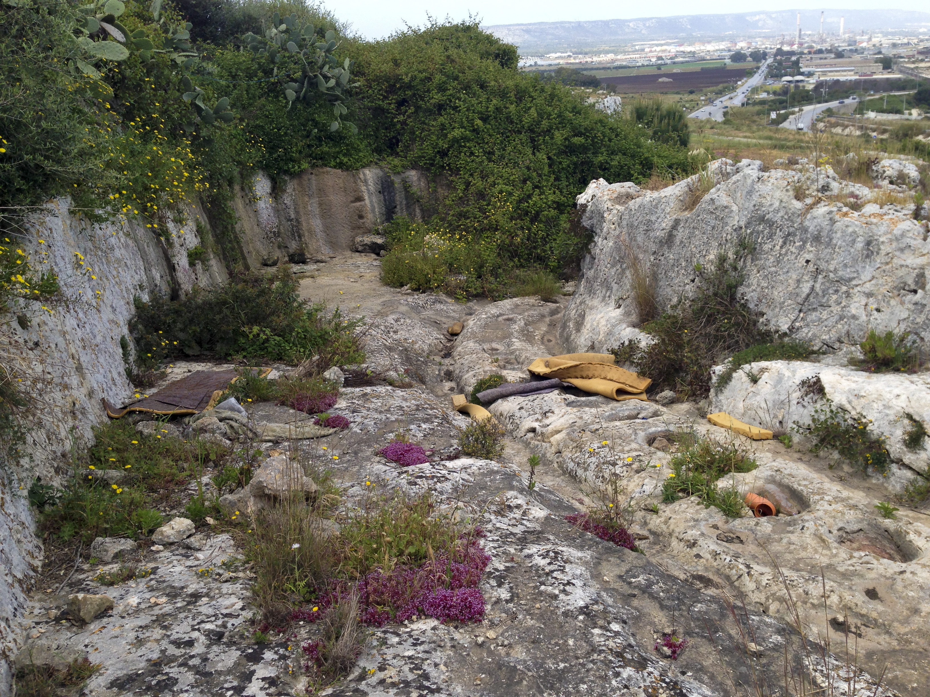 Porta urbica nord di Siracusa. Accesso storico alle mura dionigiane dalla zona Targia a Scala Greca